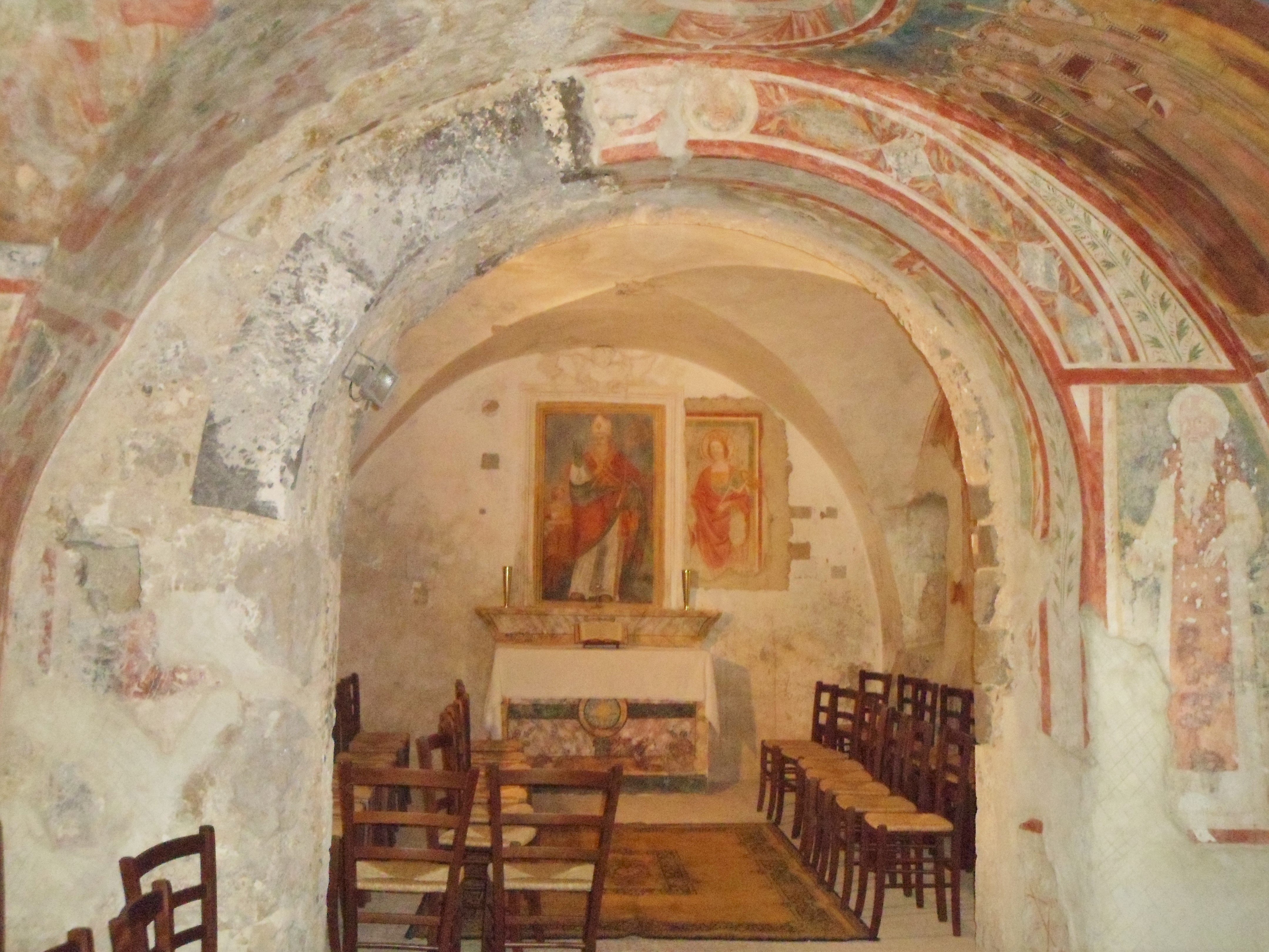 Visuale interna della cappella di Santa Maria a Castello dove si possono notare i numerosi affreschi